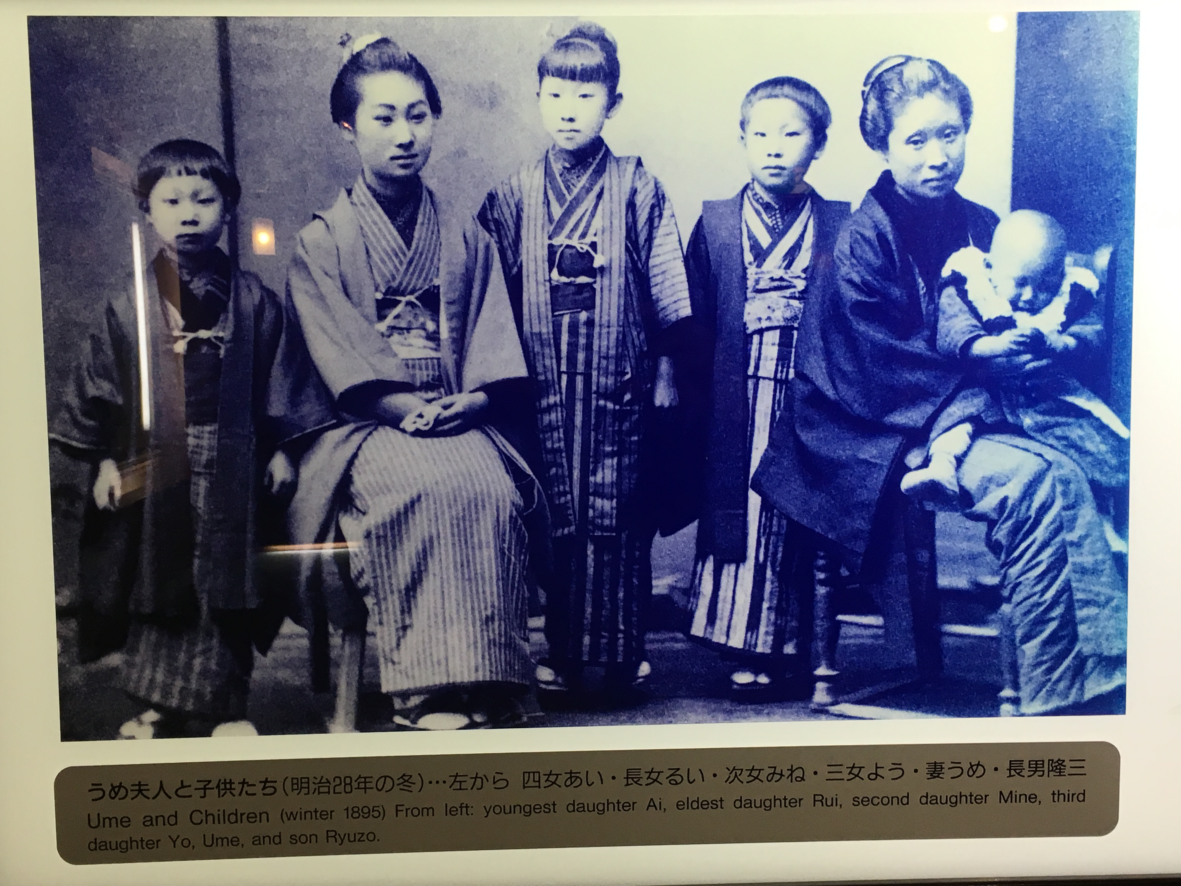 Famille de Kokichi MIKIMOTO